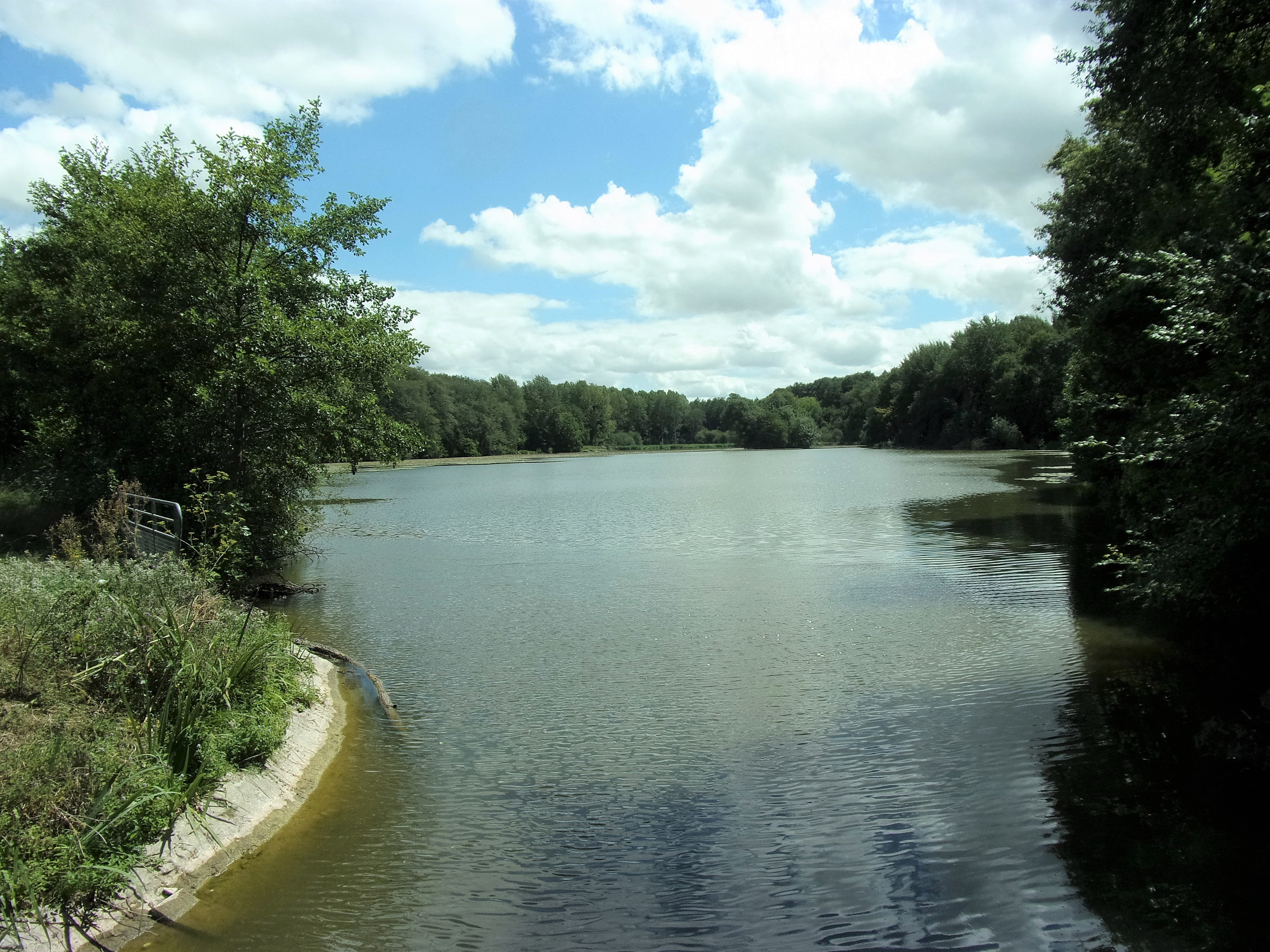 L'étang de la Corroirie vu depuis la chaussée nrd